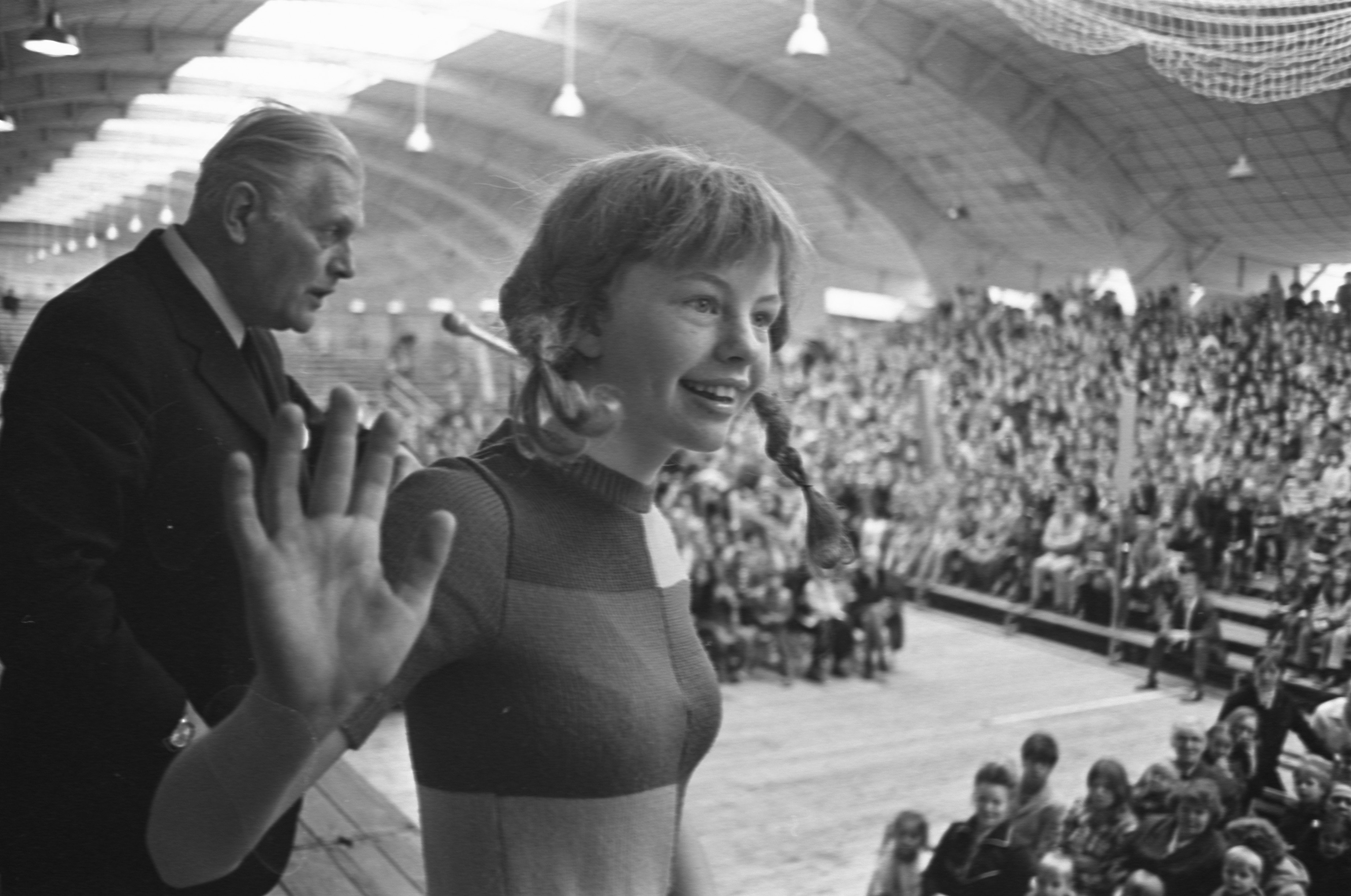 Collectie / Archief : Fotocollectie Anefo Reportage / Serie : Pippi Langkous in Nederland Beschrijving : Pippi Langkous, Zweeds kinderboek- en TV-figuur, in de oude RAI te Amsterdam Datum : 22 april 1972 Locatie : Amsterdam, Noord-Holland Trefwoorden : acteurs, kinderprogramma's, televisie Persoonsnaam : Langkous, Pippi, Nilsson, Inger Fotograaf : Fotograaf Onbekend / Anefo Auteursrechthebbende : Nationaal Archief Materiaalsoort : Negatief (zwart/wit) Nummer archiefinventaris : bekijk toegang 2.24.01.05 Bestanddeelnummer : 925-5512